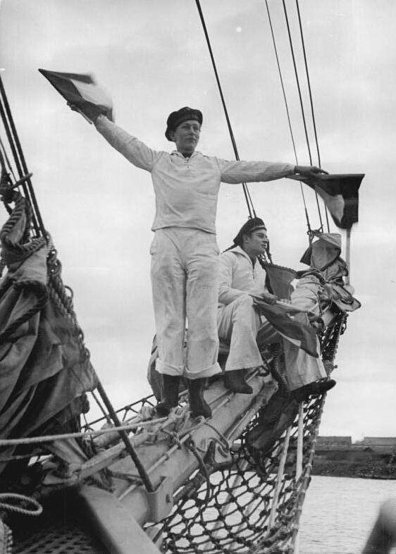 Segelschulschiff "Wilhelm Pieck", Signalgast Segelschulschiff "Wilhelm Pieck" Die zukünftigen Kapitäne, Steuerleute und Maate unserer Handelsflotte werden auf der schmucken Zweimaster-Schonerbrigg "Wilhelm Pieck" in einem 10-wöchigen Lehrgang ausgebildet. Die Schüler, die aus allen Teilen der DDR kommen und der Interessengemeinschaft für Wassersport der Freien Deutschen Jugend angehören, lernen unter Anleitung des erfahrenen Kapitäns Weitendorf, der vier Offiziere und einer 10-köpfigen Stammannschaft mit grosser Begeisterung die Bedienung des Segelschiffes. Sie wissen, dass der Tag eines einheitlichen Deutschlands nicht mehr fern ist und freuen sich darauf, mit unseren Handelsschiffen alle Meere befahren zu können. Was sie gelernt haben, werden sie dann erst richtig beweisen können. UBz: Der Signaldienst erfordert eine schnelle Auffassungsgabe. Es ist nicht so leicht wie es aussieht. - Zentralbild-Sturm 27.12.1951